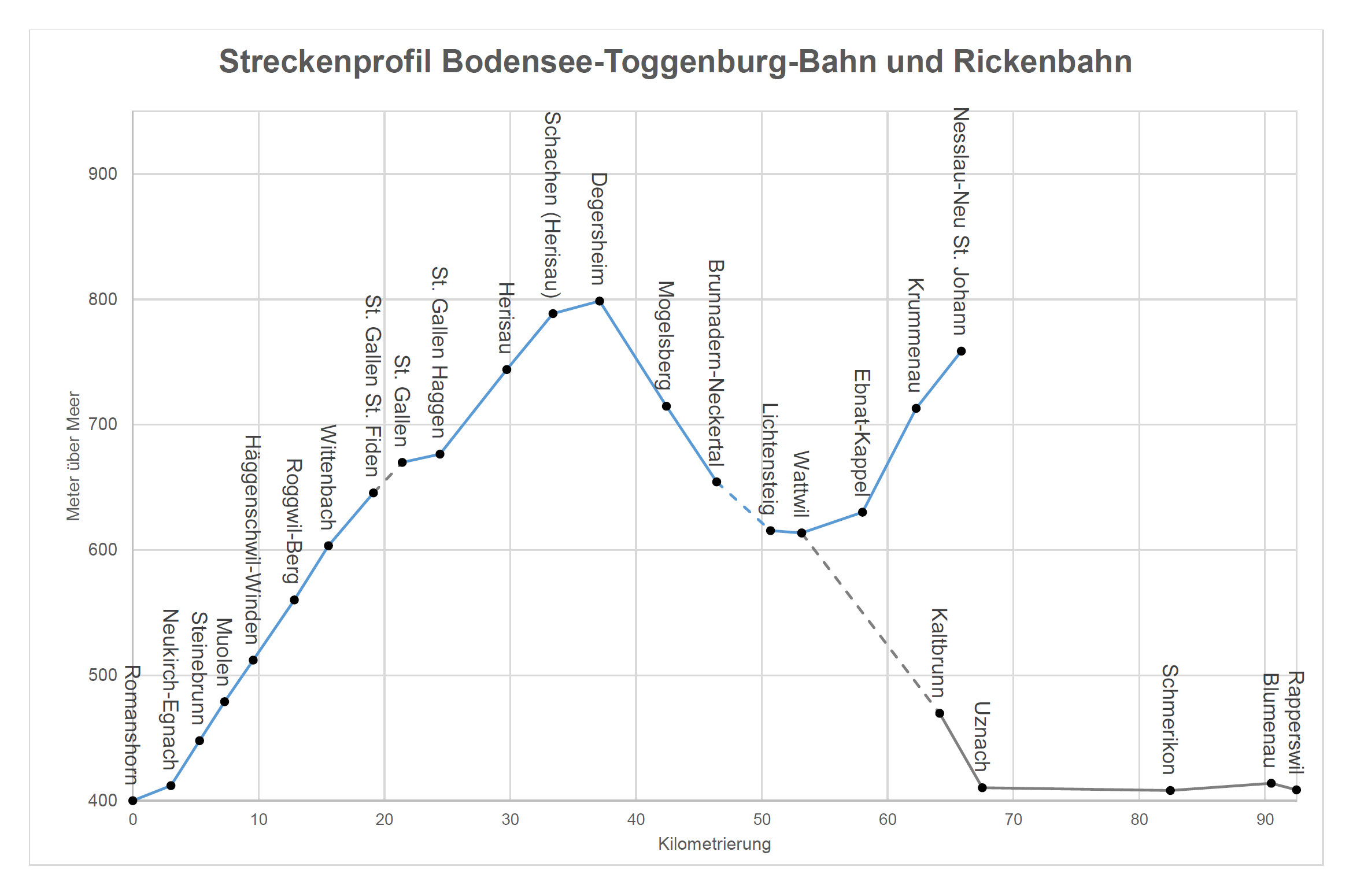 Streckenprofil der Bodensee-Toggenburg-Bahn und der Rickenbahn blau: Strecken im Eigentum der Schweizerischen Südostbahn (SOB) grau: Strecken der Schweizerischen Bundesbahnen (SBB)